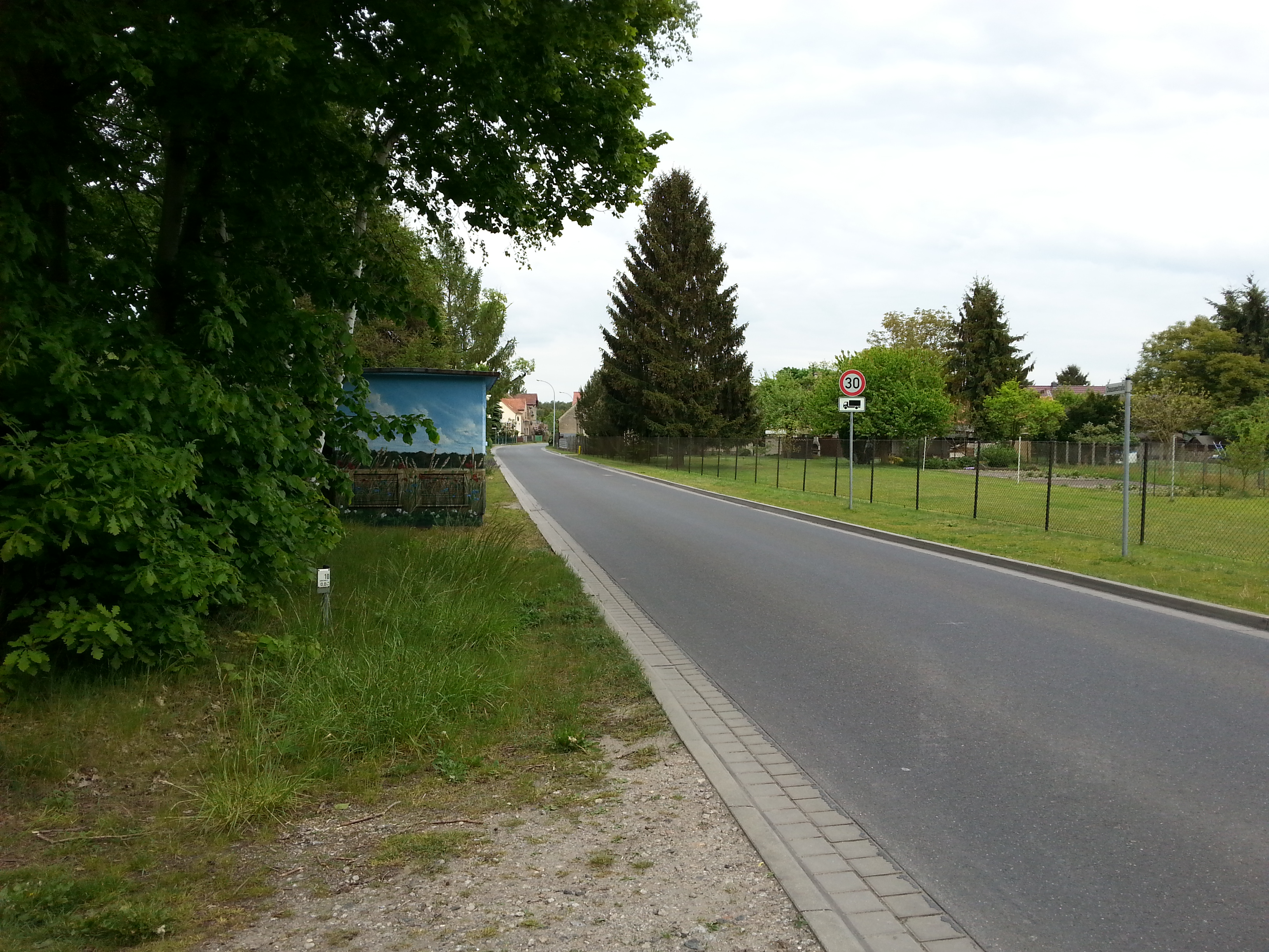 Friedrichshof, Ortseingang